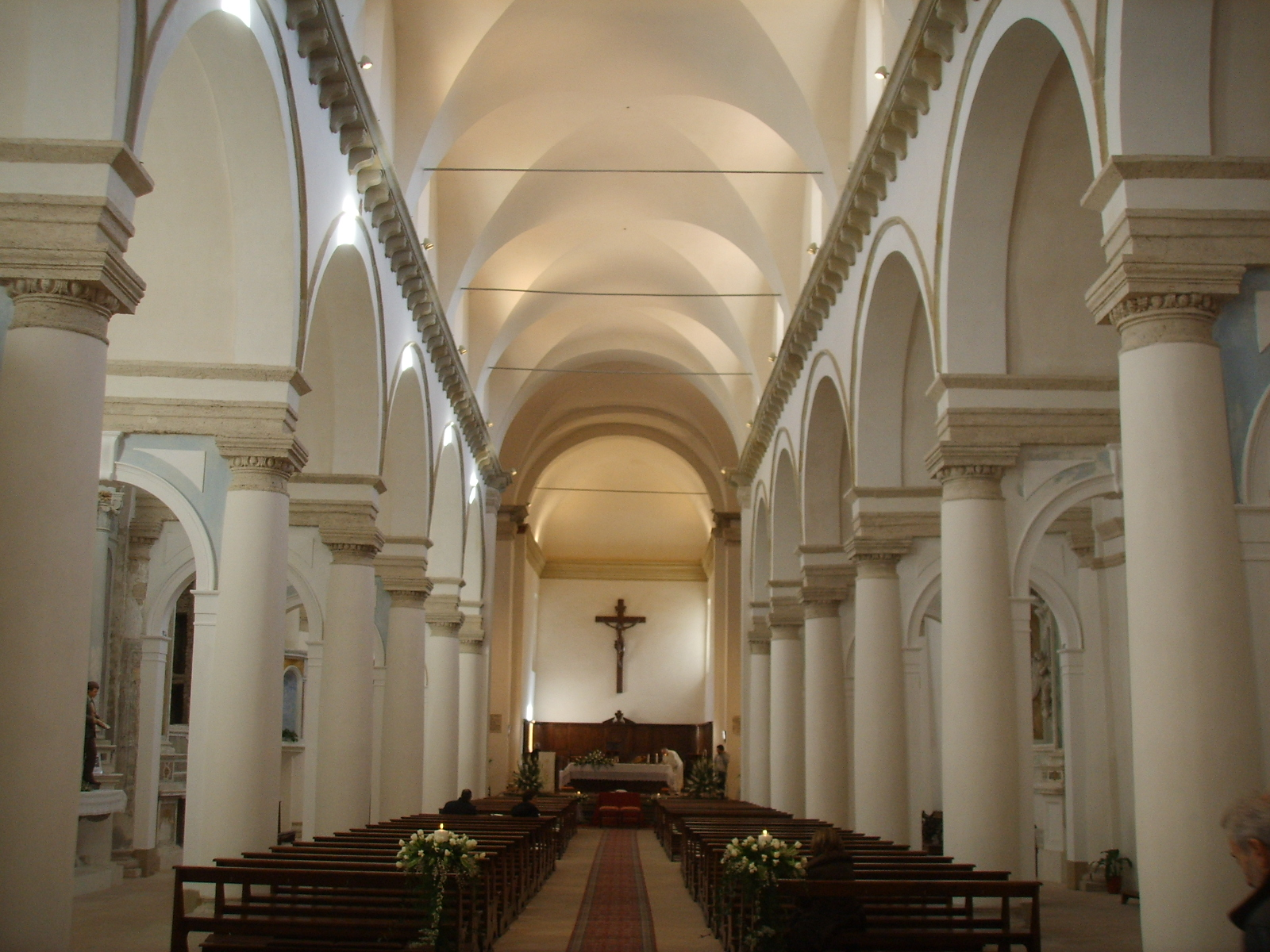 Colle valdelsa, chiesa di sant'agostino 04 interno